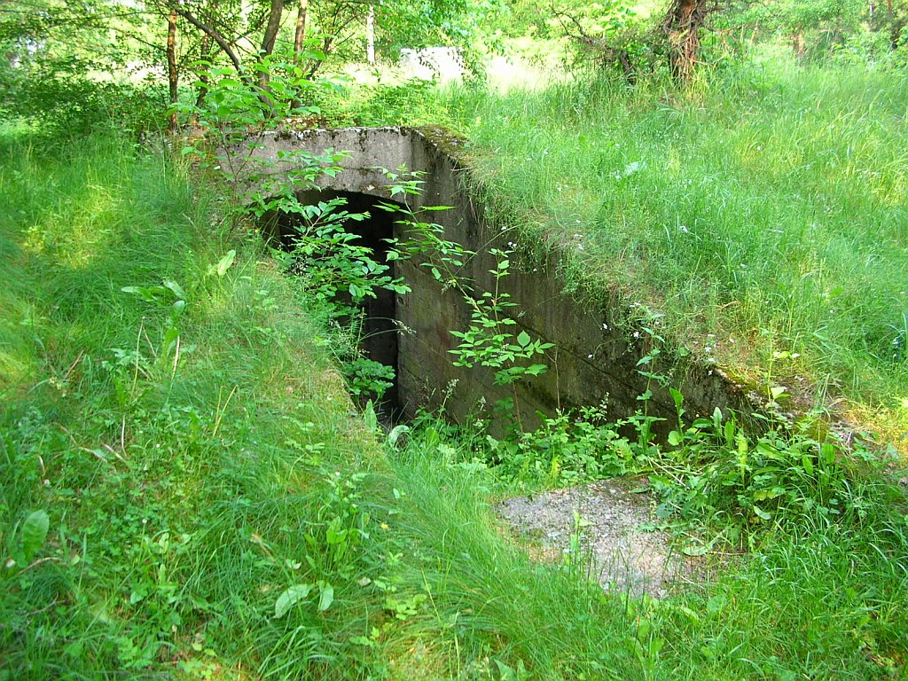 Schron z II wojny światowej w Puszczy Bydgoskiej